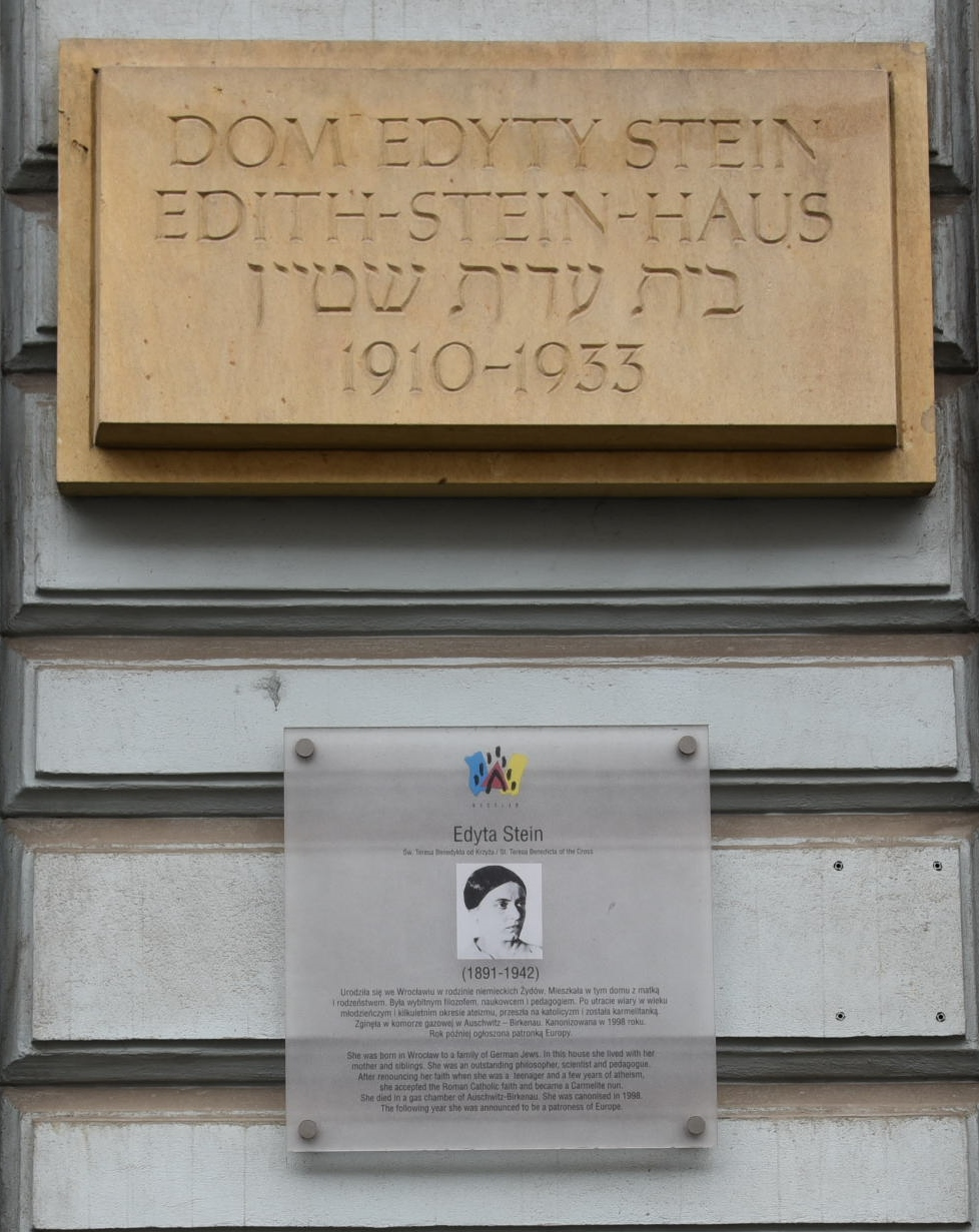 Edith-Stein-Haus Tafeln